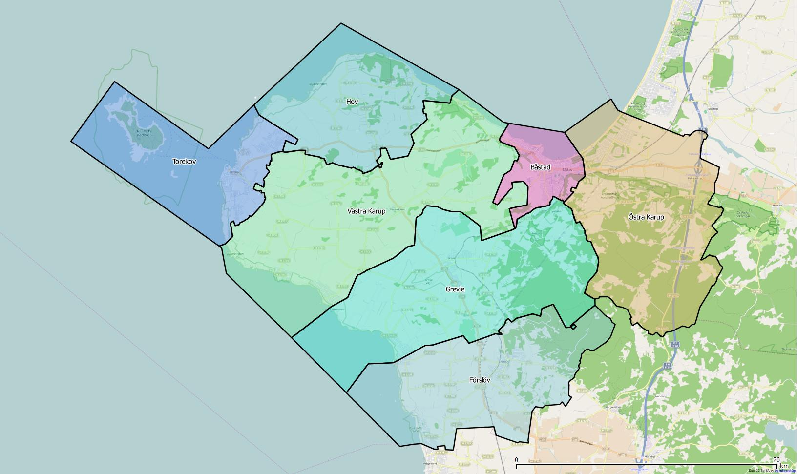 Distriktsindelningen i Båstad kommun